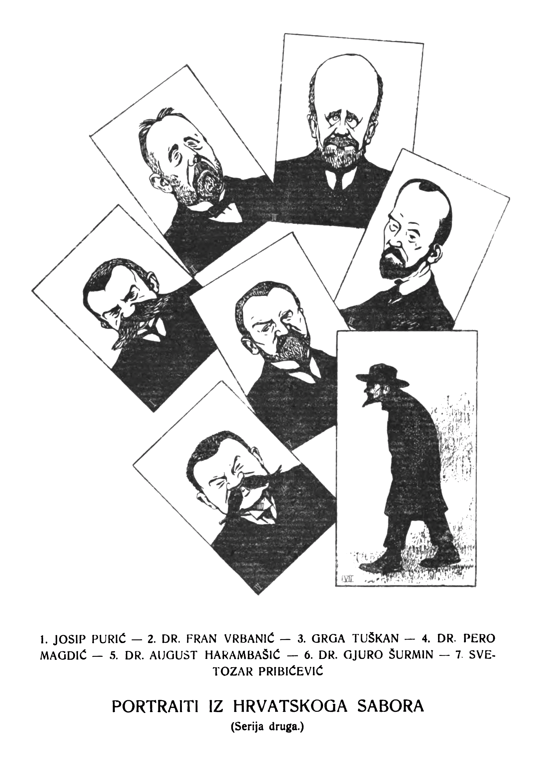 Josip Purić; dr. Fran Vrbanić; Grga Tuškan; dr. Pero Magdić; dr. August Harambašić; dr. Gjuro Šurmin; Svetozar Pribićević